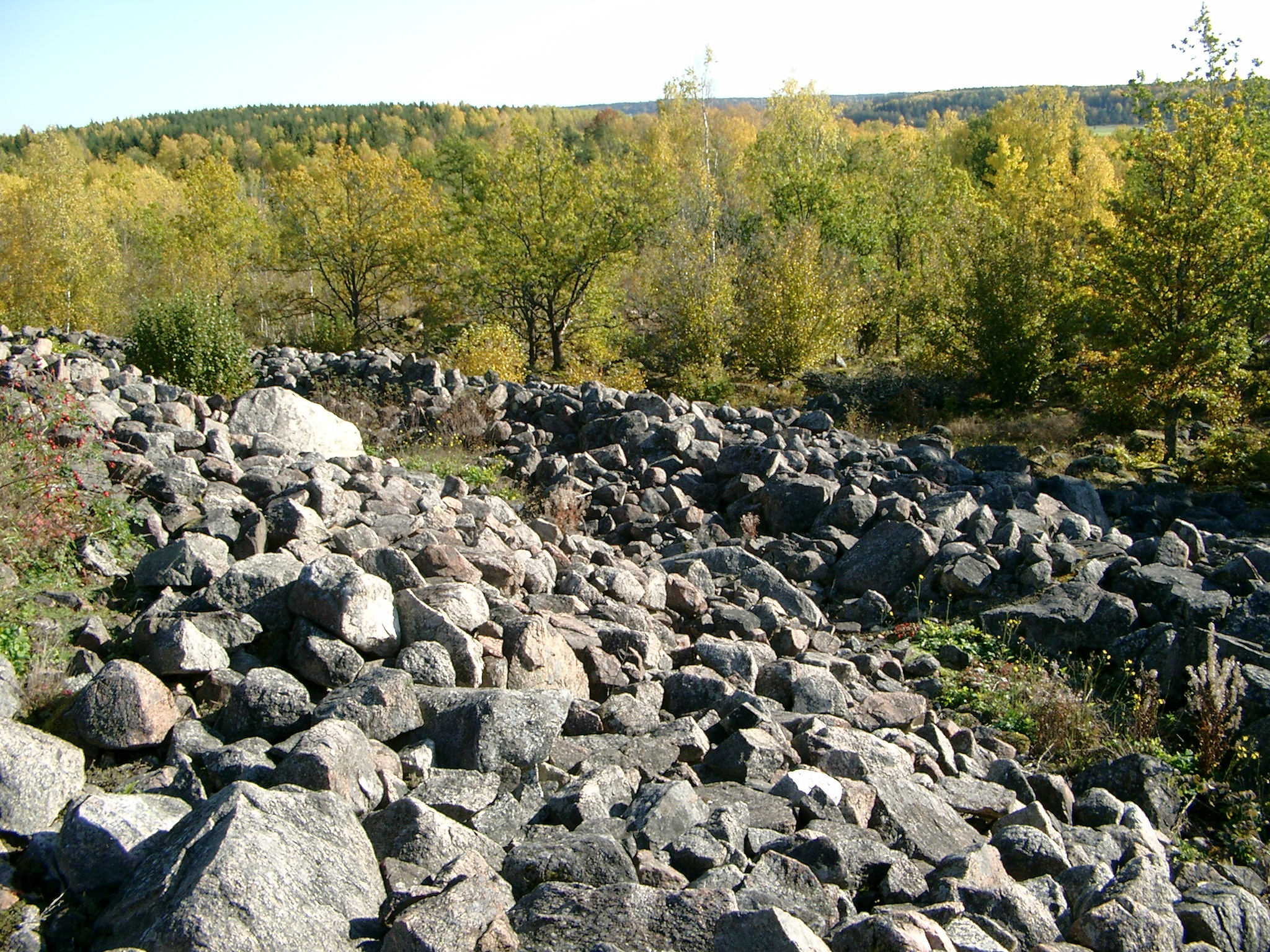 Die vorgeschichtliche Burg Broborg in der Gemeinde Knivsta mit Blick auf inneren und den äußeren Wall in Richtung Osten.